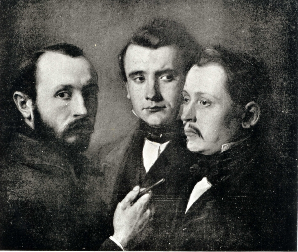 Portret trzech braci Simmlerów: Józefa, Karola i Juliana Olej na płótnie